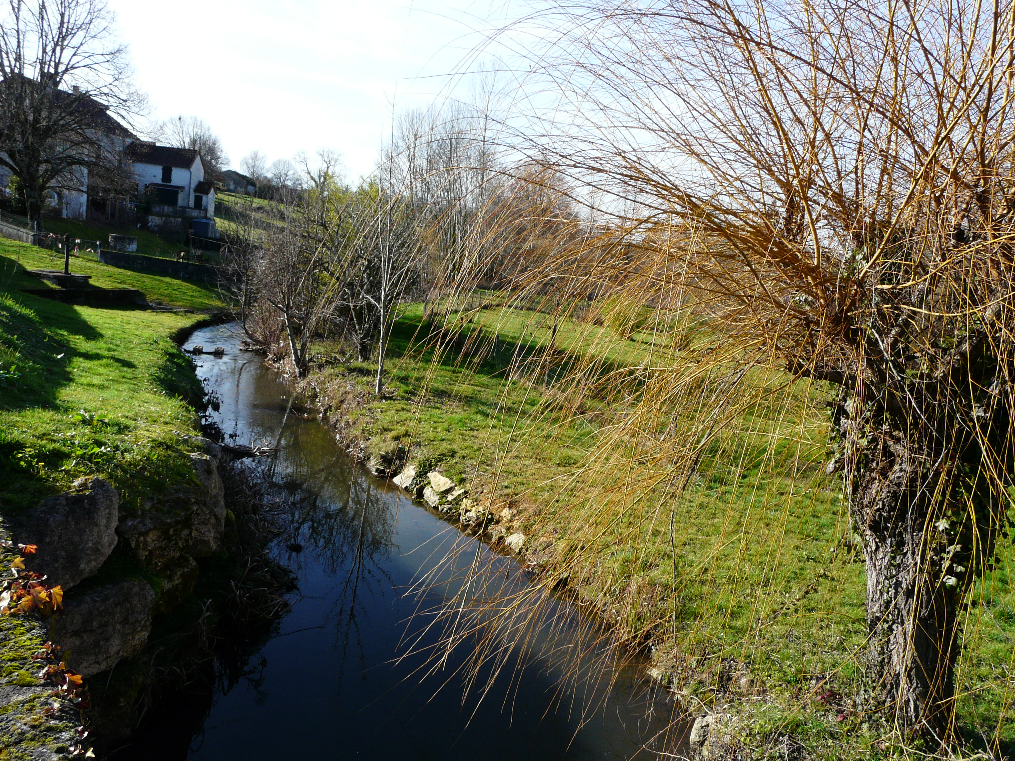 Ruisseau la Belle en contrebas du bourg de Monsec, Dordogne, France. Vue prise en direction de l'aval.